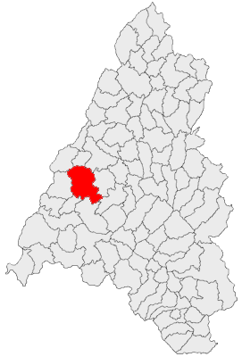 Categorie:Hărţi ale judeţului Bihor